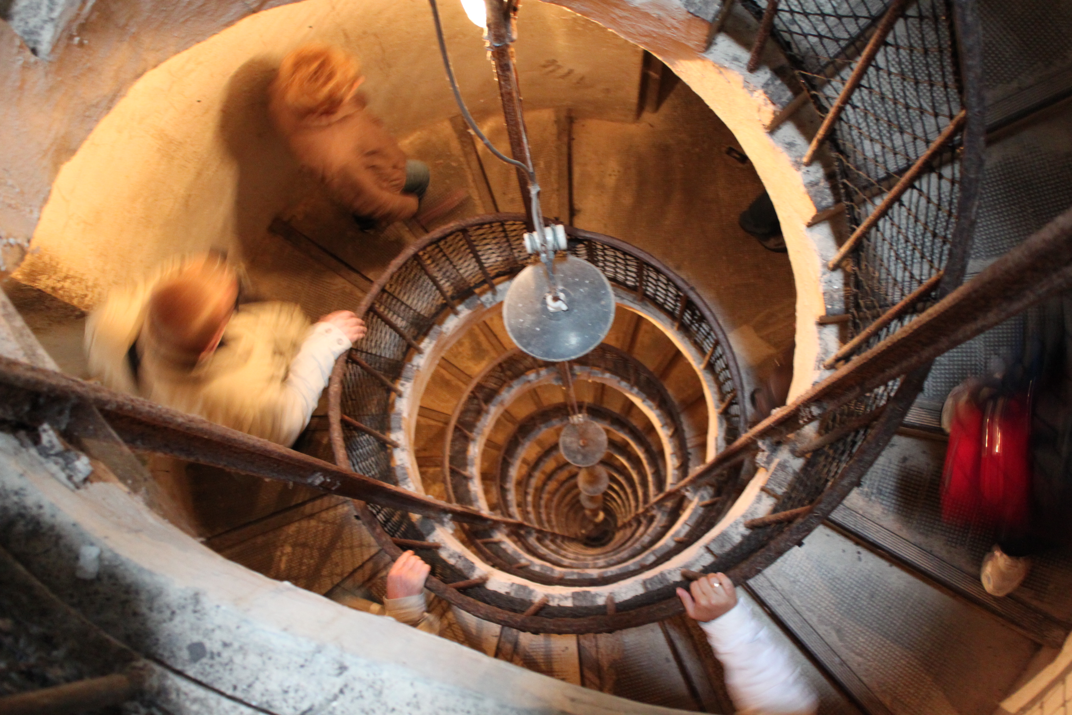 Fort de Joux, Doubs, Franche-Comté, France